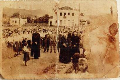 Lançamento da pedra fundamental da Igreja Nosso Senhor do Bonfim (Braço do Norte). Em 7 de setembro de 1931 é lançada a pedra fundamental da igreja. A edificação de dois pavimentos ao fundo abriga a atual prefeitura municipal.